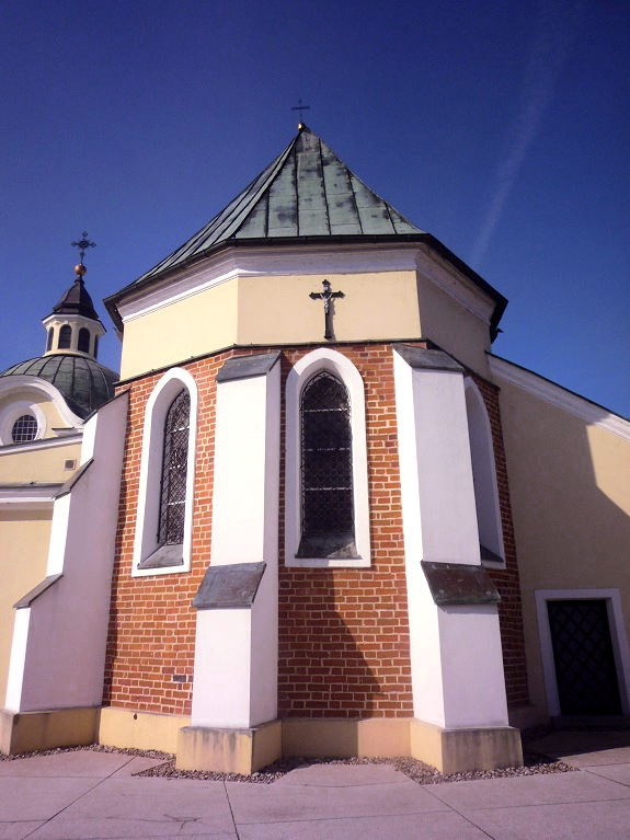 Gotyckie prezbiterium kościoła św. Wojciecha w Brdowie (woj. wielkopolskie)